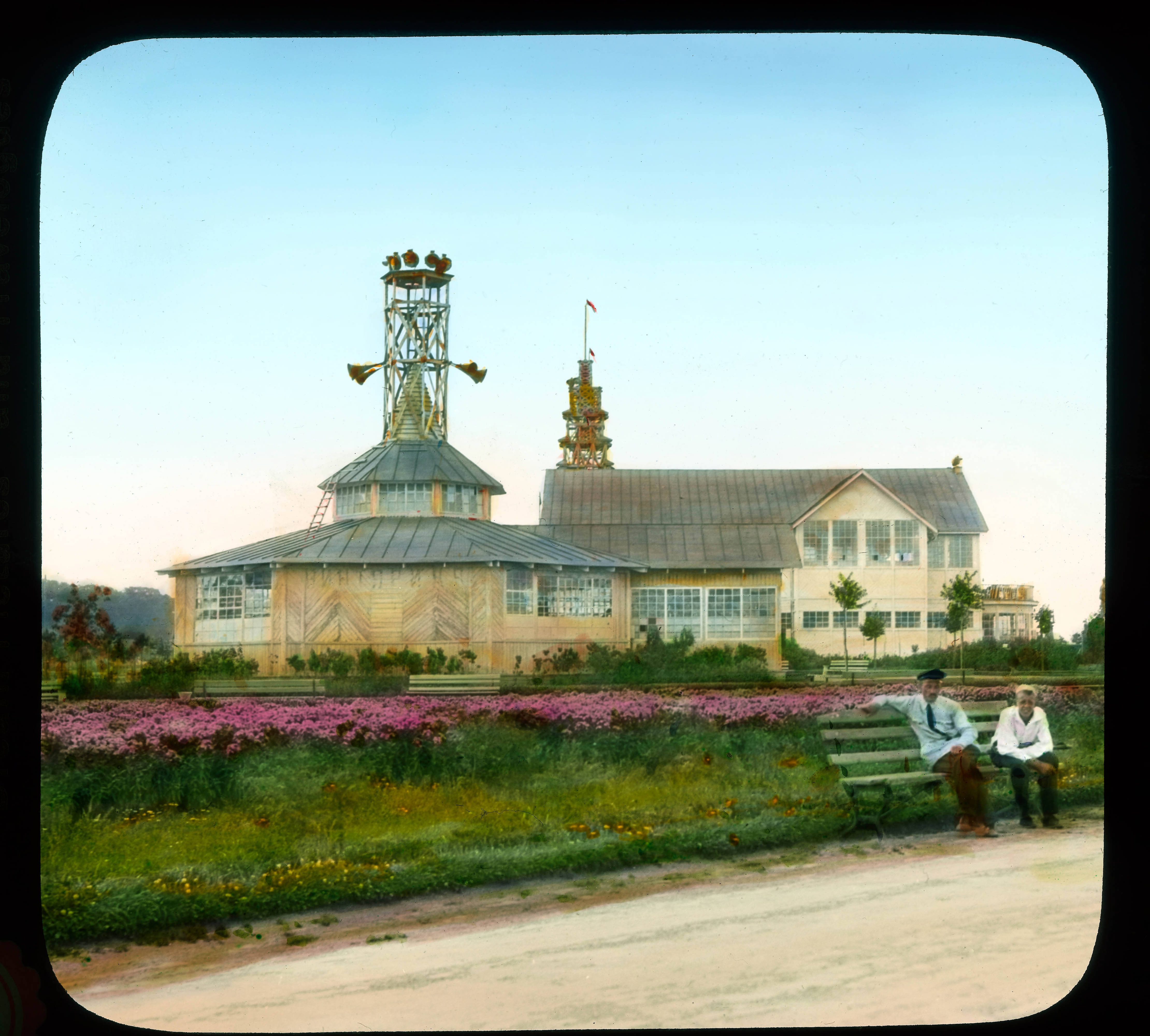 Москва. Парк культуры и отдыха им. Горького